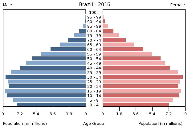 Brasilien